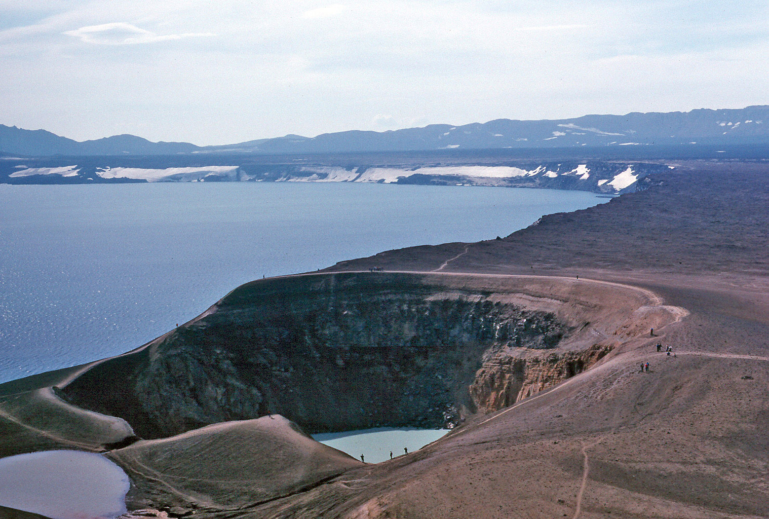 Kessel des Vulkansystems Askja (Island).